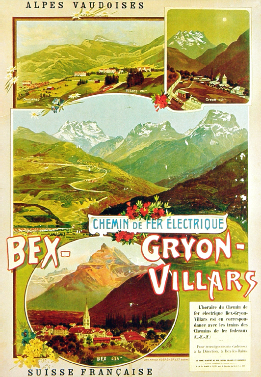 Werbeplakat der Chemin de fer électrique Bex-Gryon-Villars